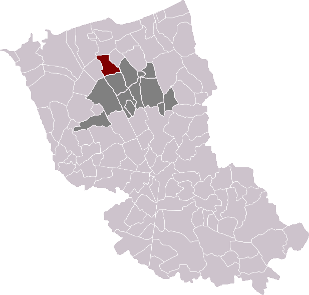 Locatie gemeente Armboutskappel in arrondissement Duinkerke. Zelfgemaakt. Location of Armbouts-Cappel municipality in the arrondissement of Dunkirk. Self made. Localisation de la commune d'Armbouts-Cappel dans l'arrondissement de Dunkerque. Fait moi-même.